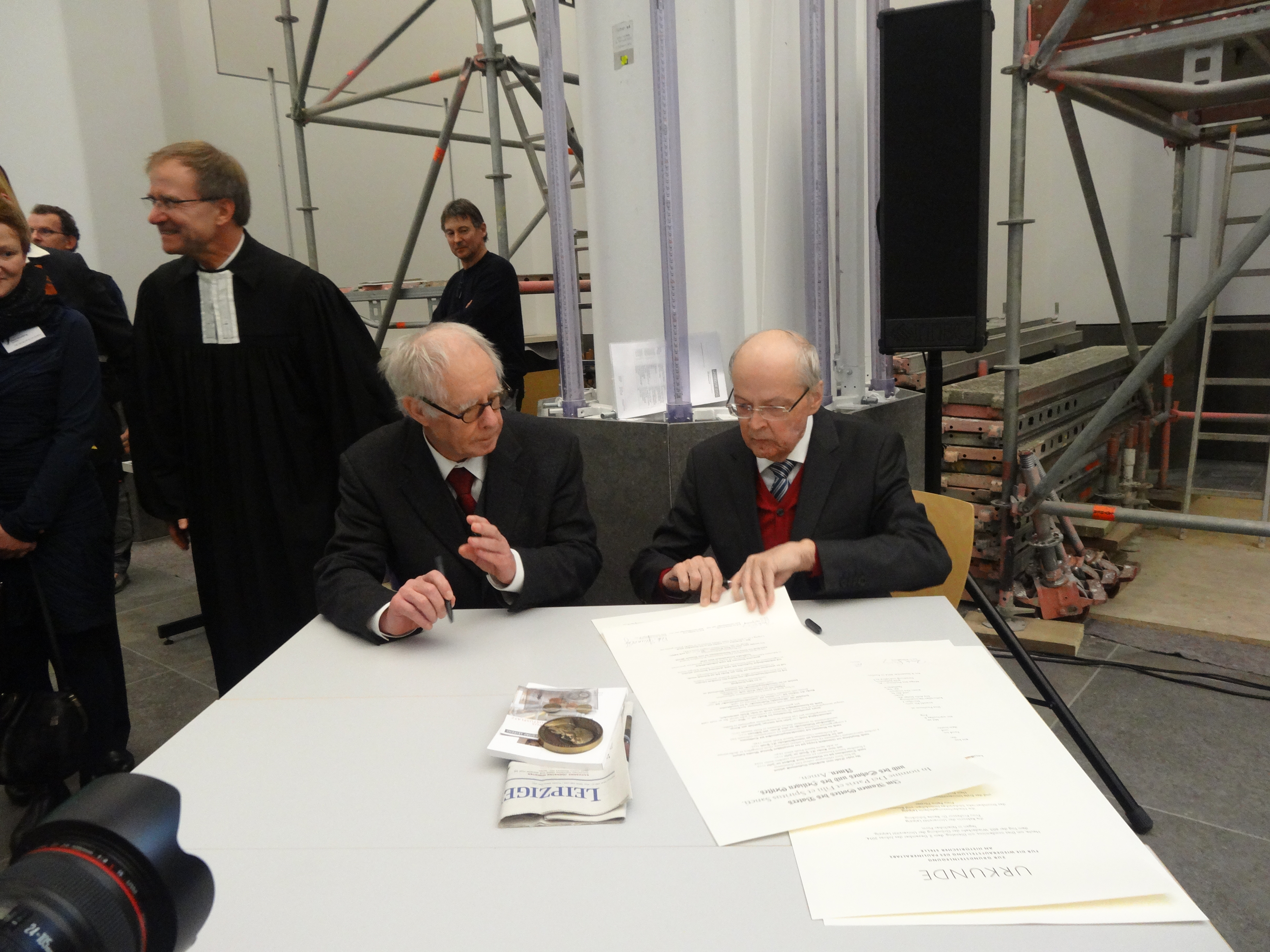 Altargrundsteinlegung für den Pauliner-Altar in der Universitätskirche St. Pauli am 02.12.2014, links Rüdiger Lux, Erster Universitätsprediger von 2009-2012 und rechts Martin Petzoldt, Erster Universitätsprediger 1998-2009 beim Unterzeichnen der Urkunde der Theologischen Fakultät